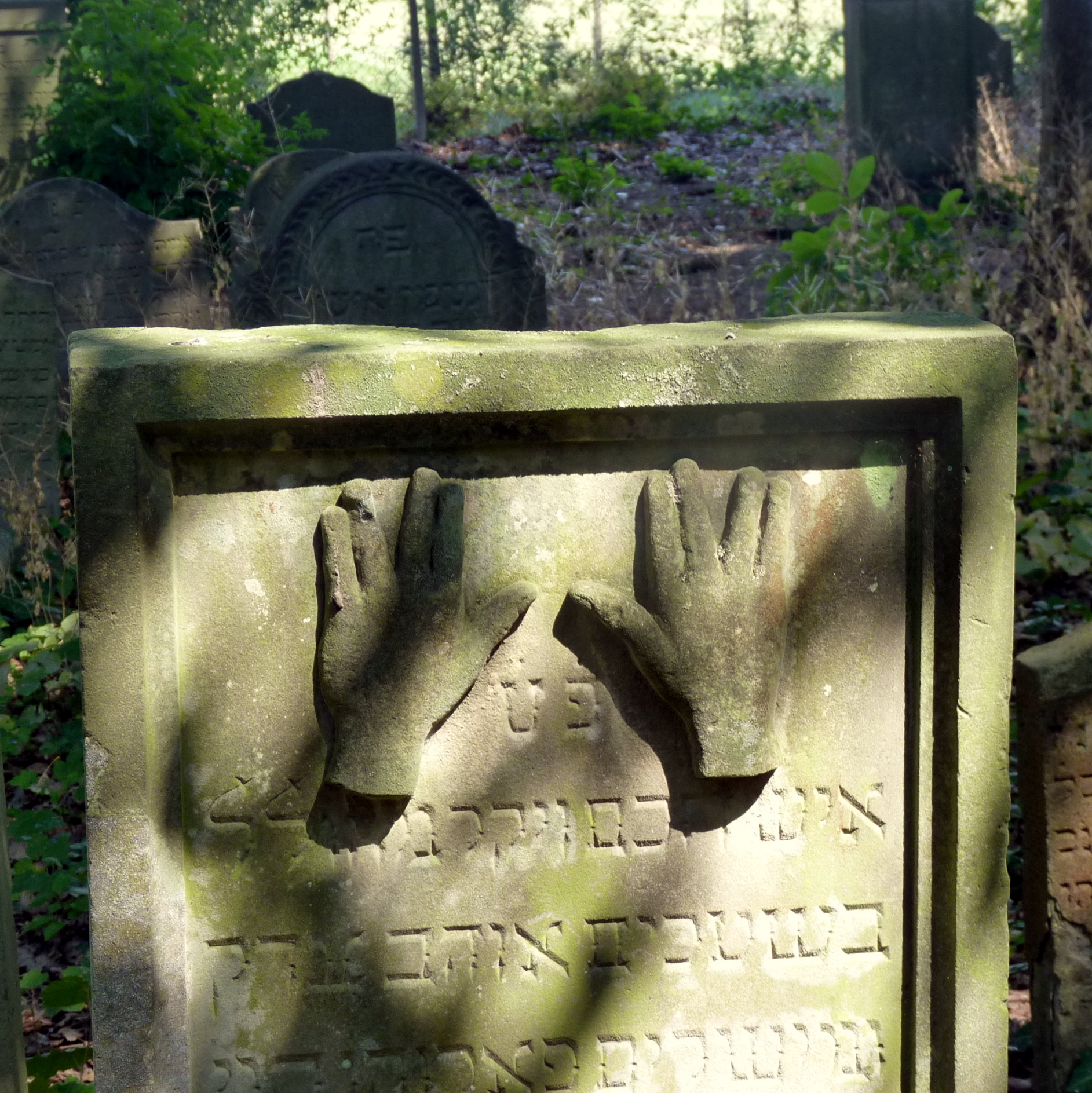 Kohanimsegen auf jüdischem Grabstein (Mazewa)